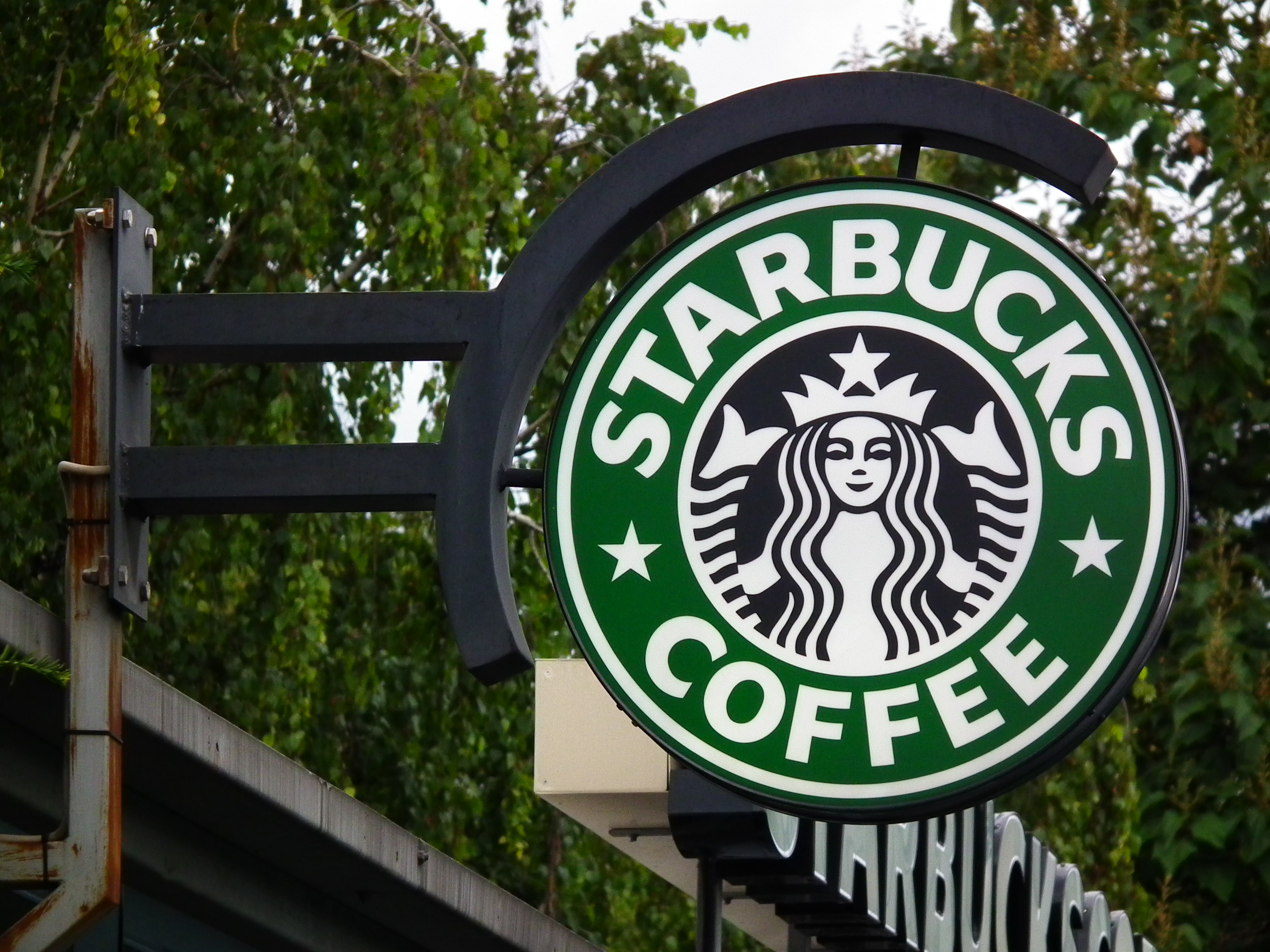 Starbucks Coffee in O7, Mannheim (Baden-Württemberg, Deutschland).